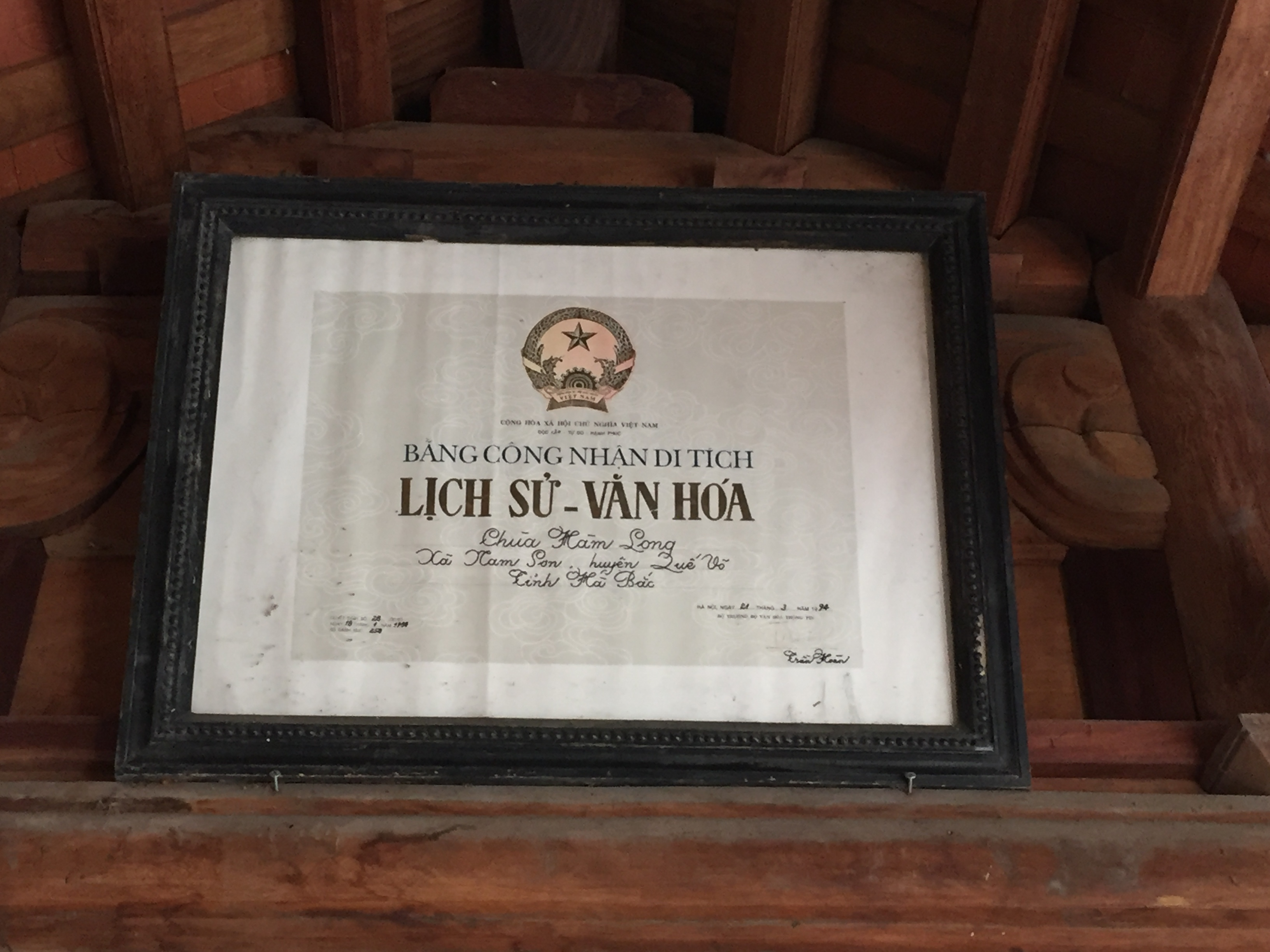 Bằng công nhận chùa Hàm Long là Di tích Lịch sử - Văn hóa của Bộ Văn hóa - Thông tin năm 1994, ban hành theo Quyết định số 28-VH/QĐ ngày 18/01/1988 của Bộ Văn hóa.